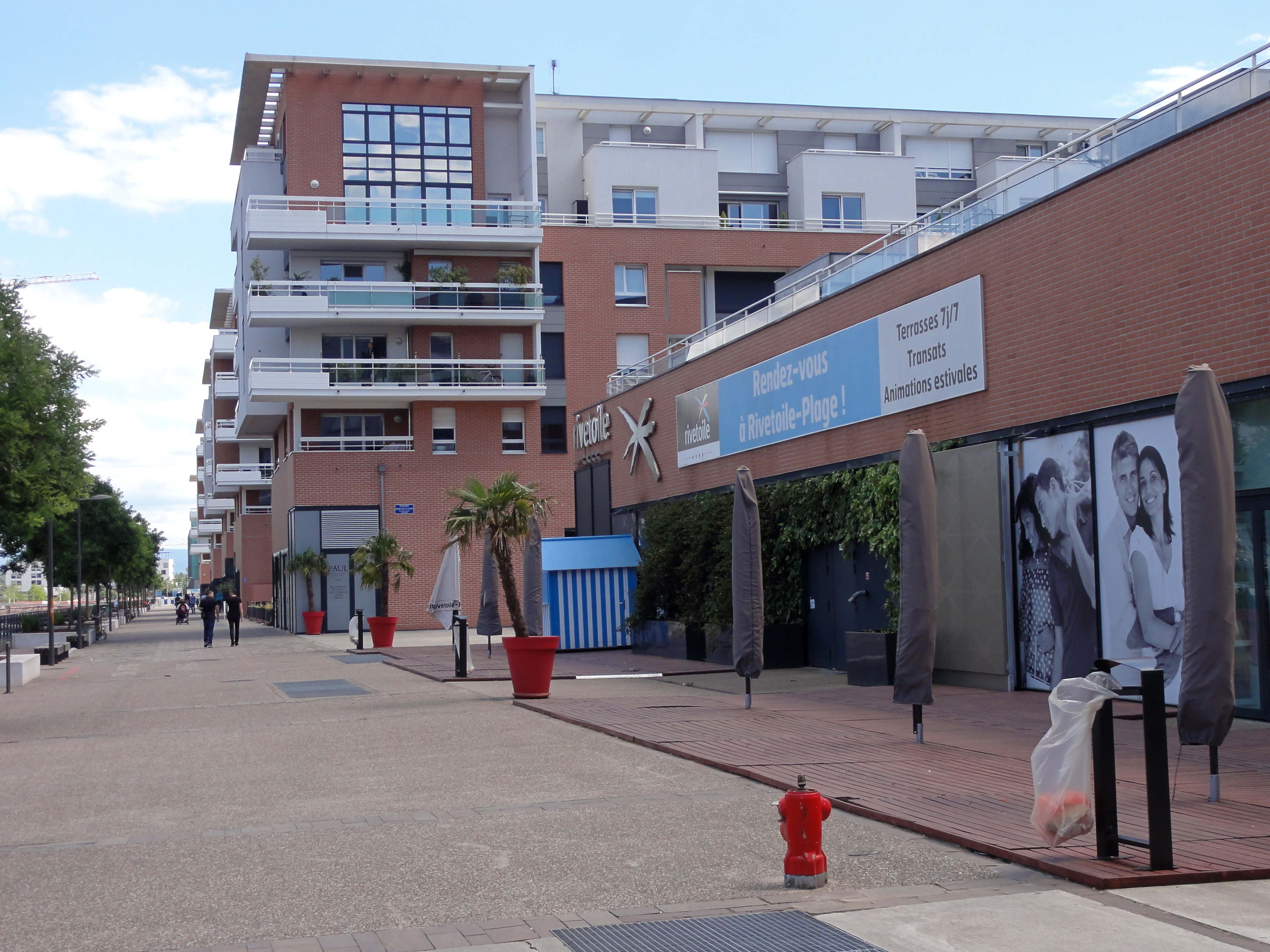 Alsace, Bas-Rhin, Strasbourg-Neudorf, Rivétoile, Quai Jeanne Helbling.